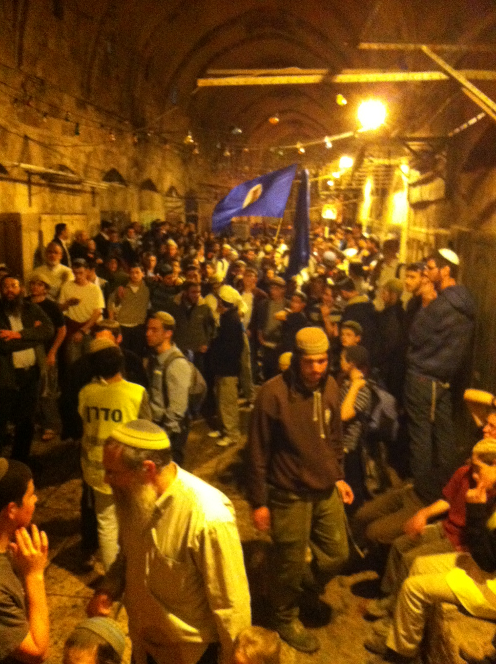 סיבוב שערים